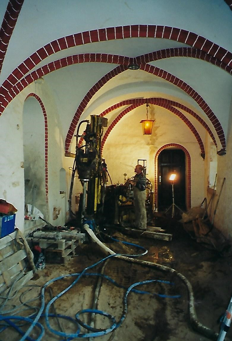 Bodensanierung des Kreuzgangs im Refektorium des Klosters Dobbertin.